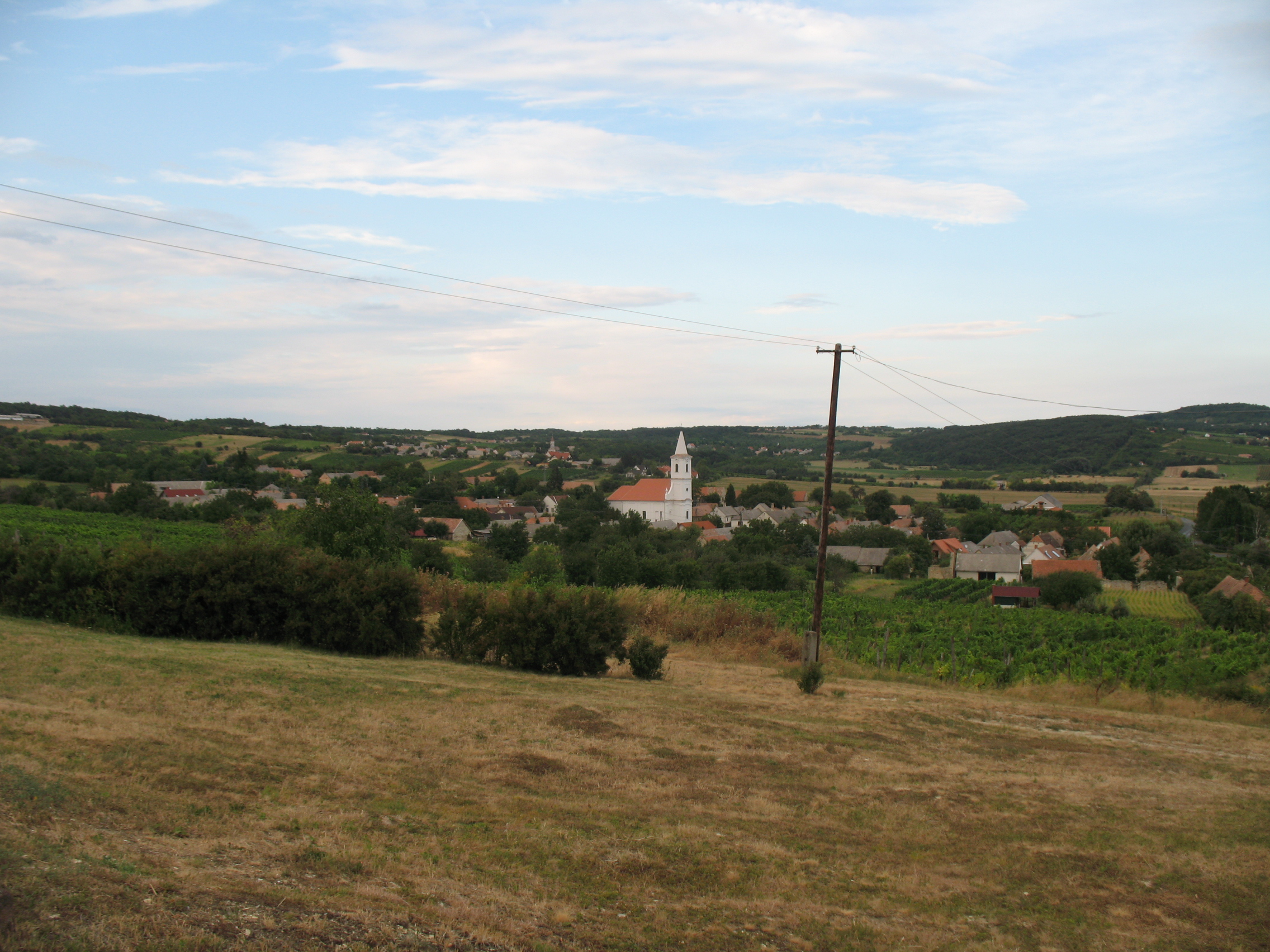 Balatoncsicsó